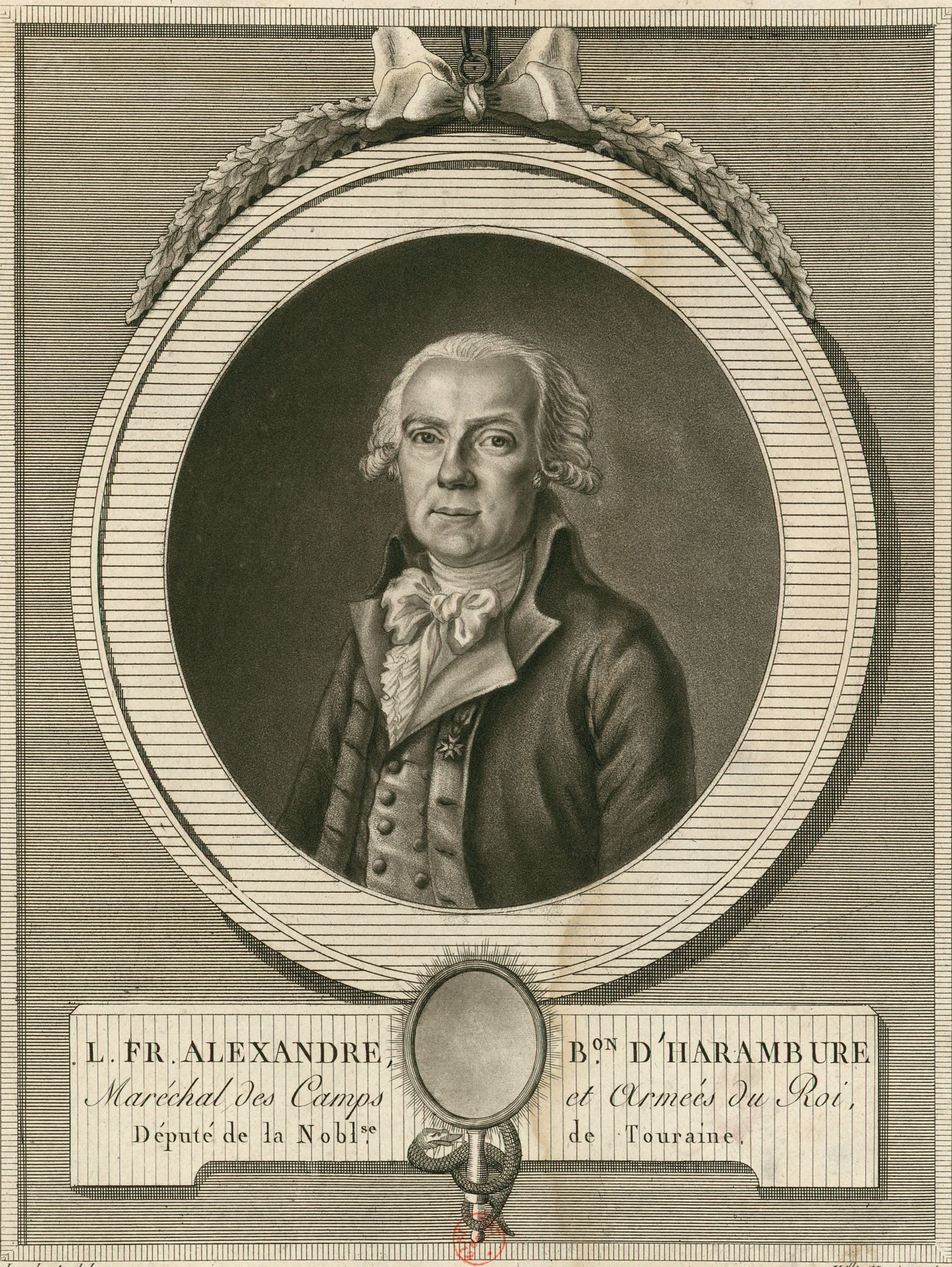 Louis-François-Alexandre d'Harambure (1742-1828), maréchal des camps et armées du roi, député de la noblesse du bailliage de Tours aux États généraux de 1789. Tiré de la Collection générale des portraits de MM. les députés à l'Assemblée nationale (1791).